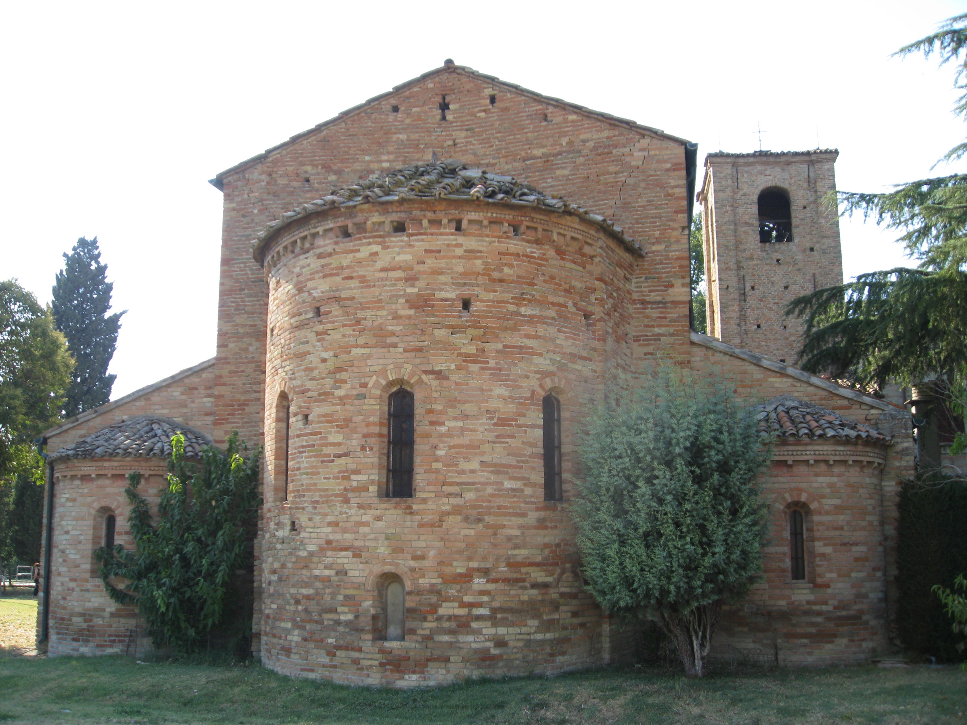 Abside della Pieve di Santa Maria in Acquedotto